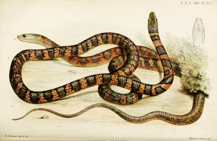 Hemerophis socotrae